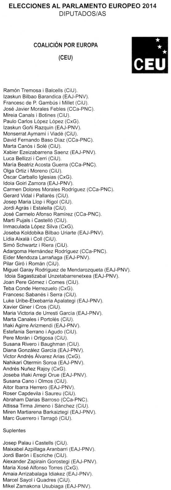 CEU-Princast europeas 2014